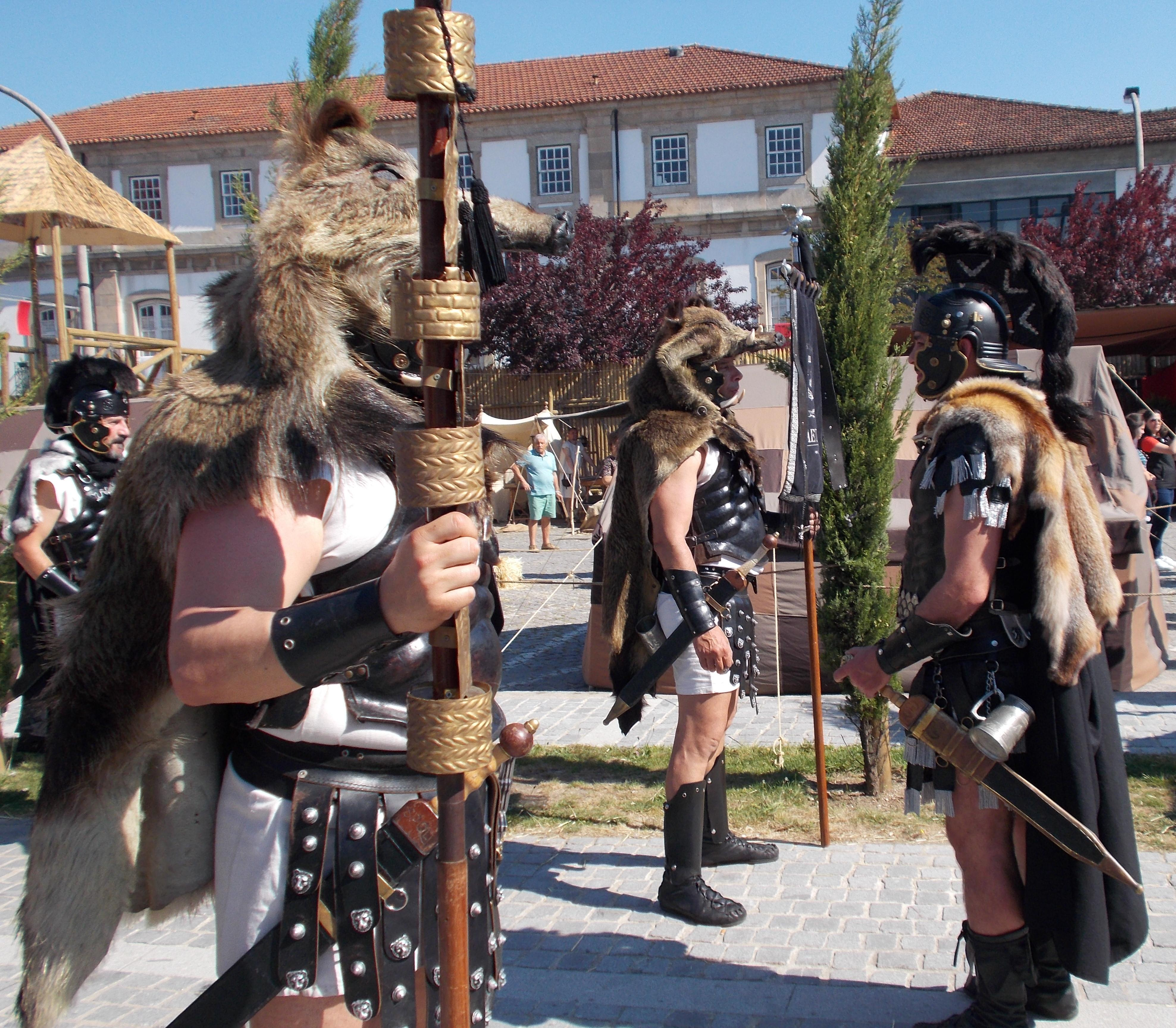 Guarda Pretoriona em Braga no evento da Braga Romana.